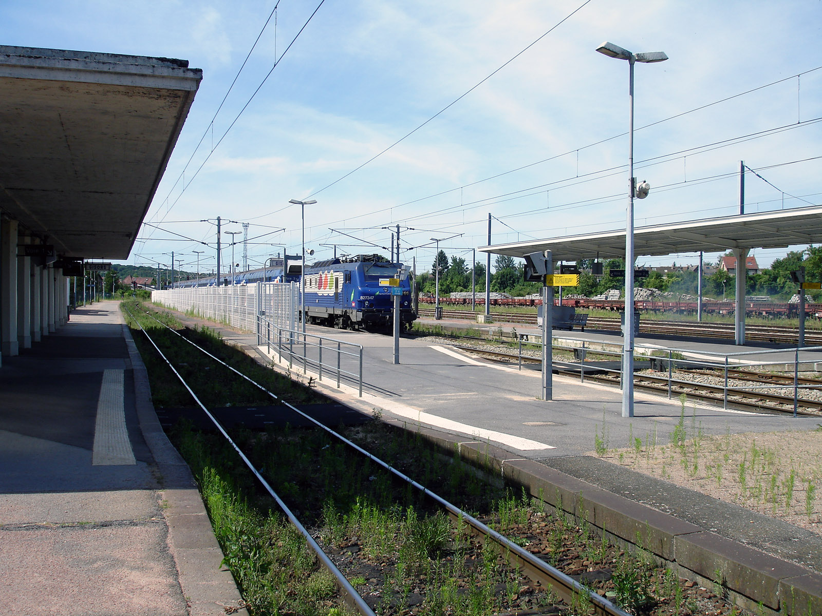 La gare de Gisors, Eure, France.